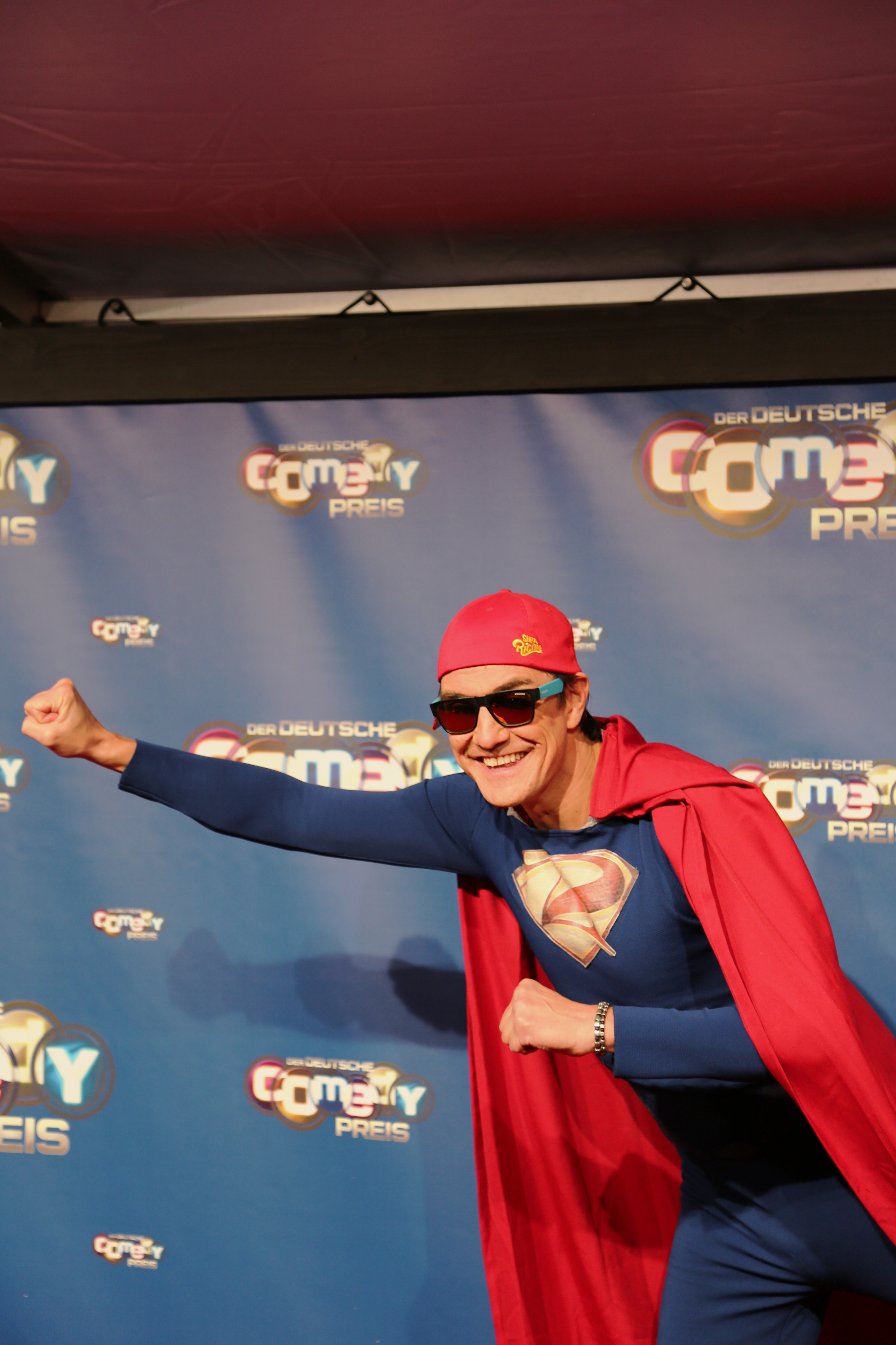 Matze Knop beim Deutschen Comedypreis 2017.